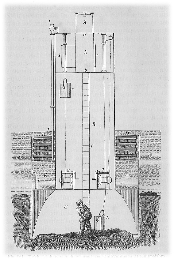 Dykkerklokke som blev brugt ved ombygningen af Knippelsbro i København 1868